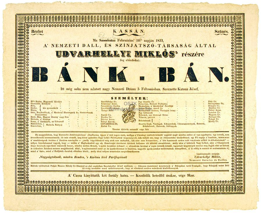 Az első Bánk bán szereposztás. Kassa 1833